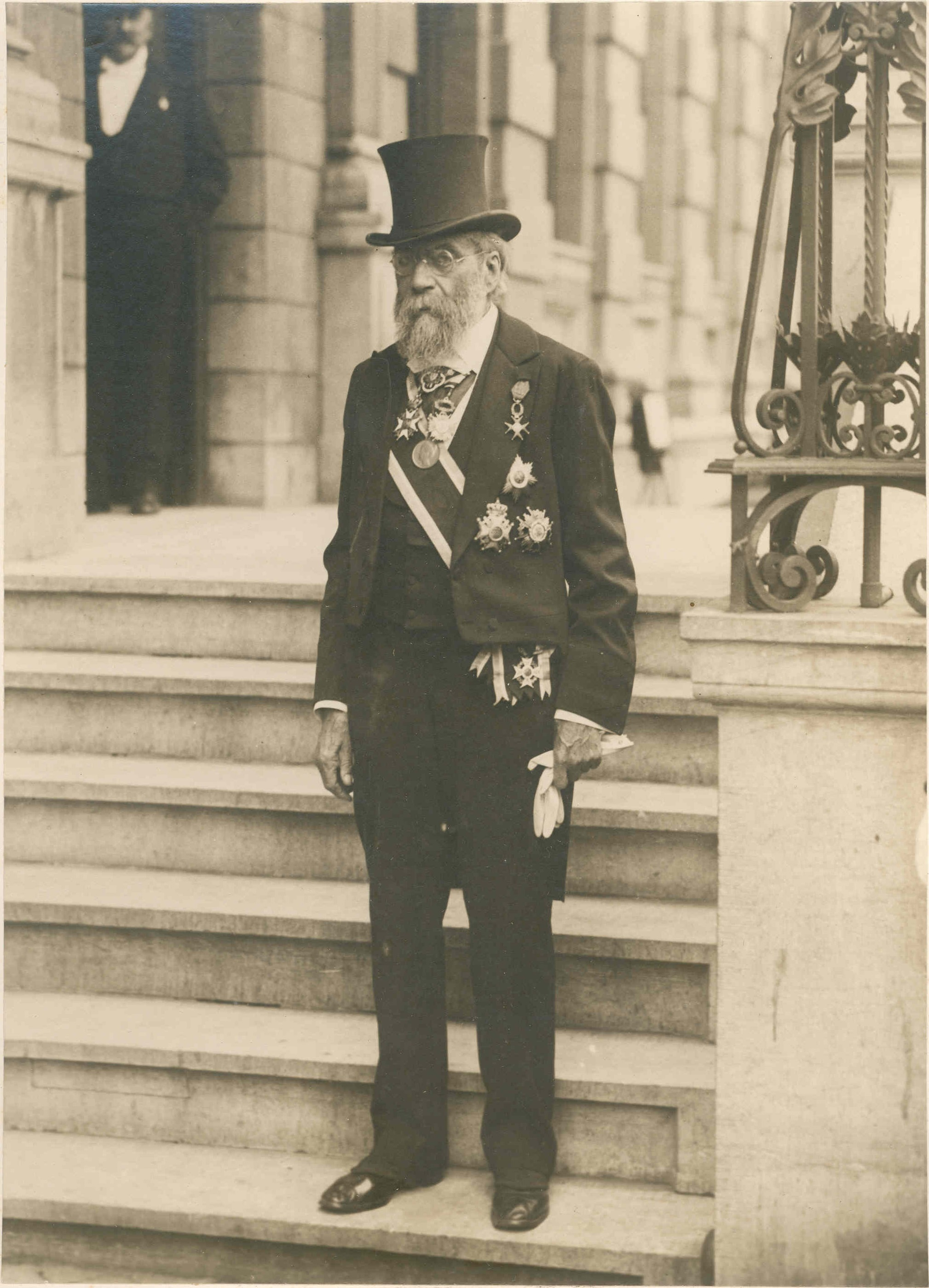 Portretfoto van Pierre Cuypers genomen tijdens de huldiging ter gelegenheid van zijn 90e verjaardag. Hij is gekleed in jacquet met hoge hoed en draagt verschillende onderscheidingen. Van deze foto bestaat een tweede afdruk in het Cuypershuis met inventarisnummer 0663-4.